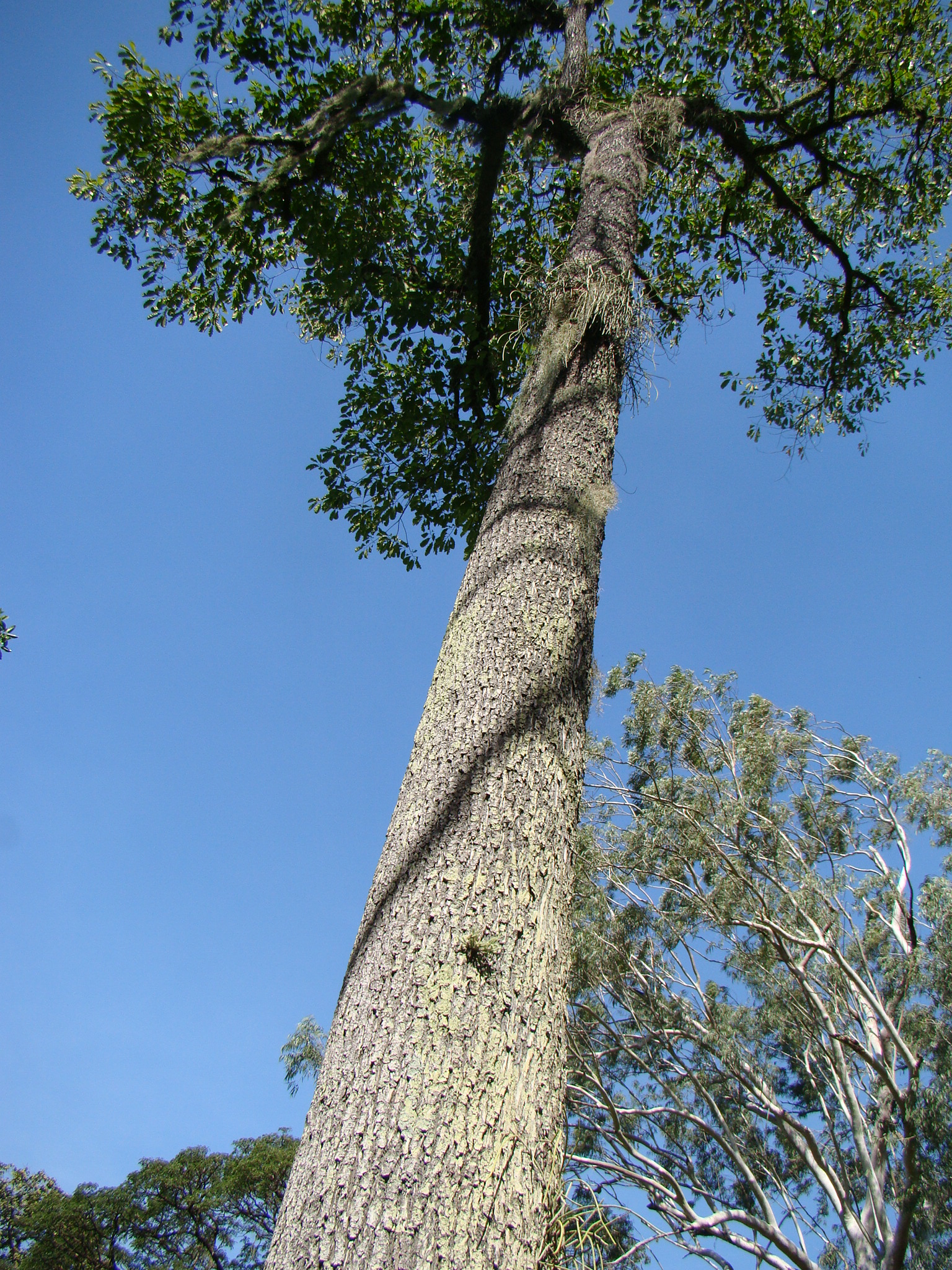 Jardim Botânico Rio de Janeiro